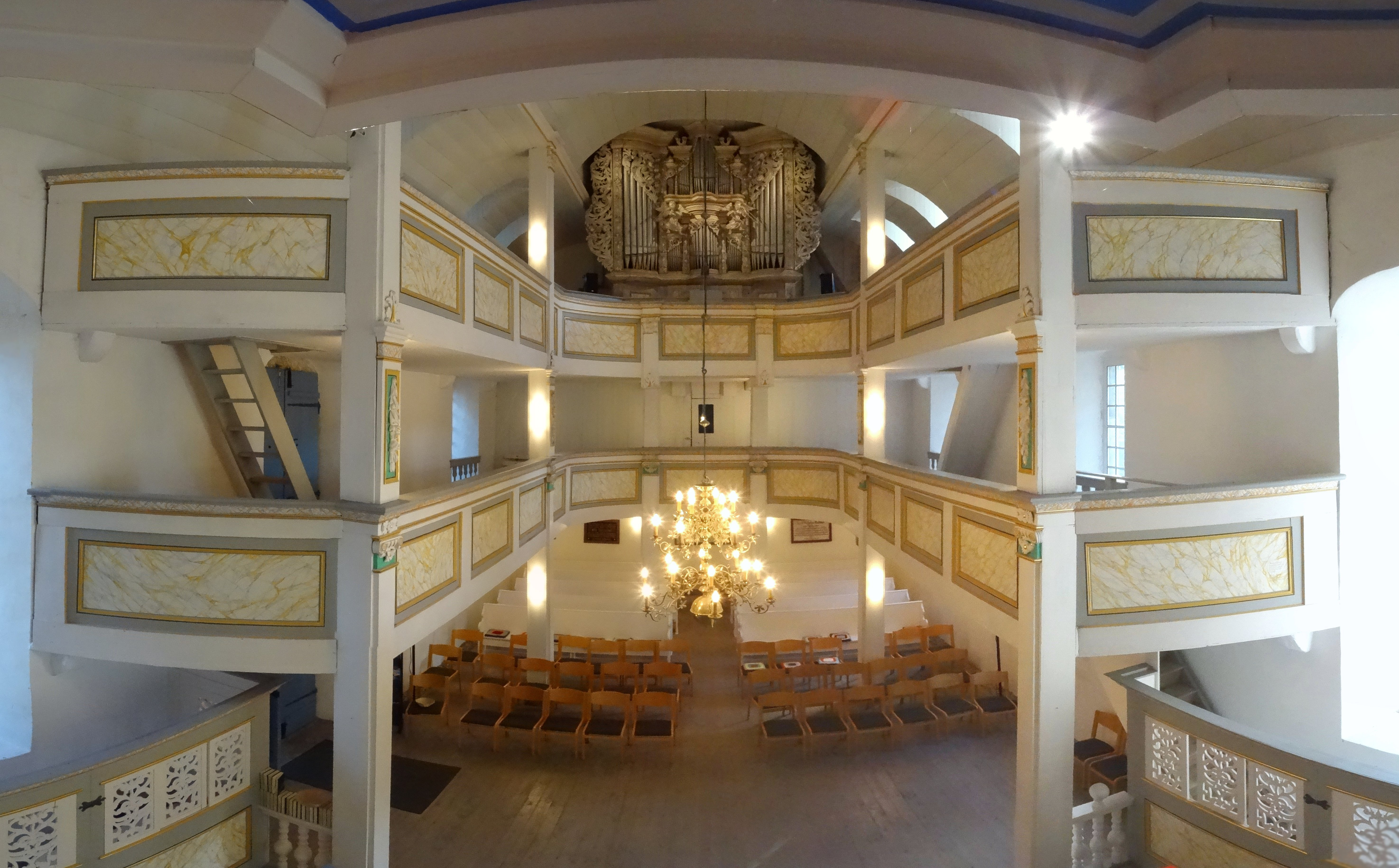 Innenraumpanorama zur Himmelspforte Niedernissa